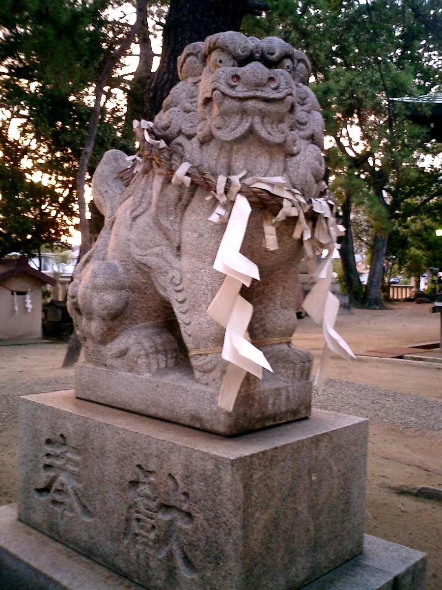 Komainu